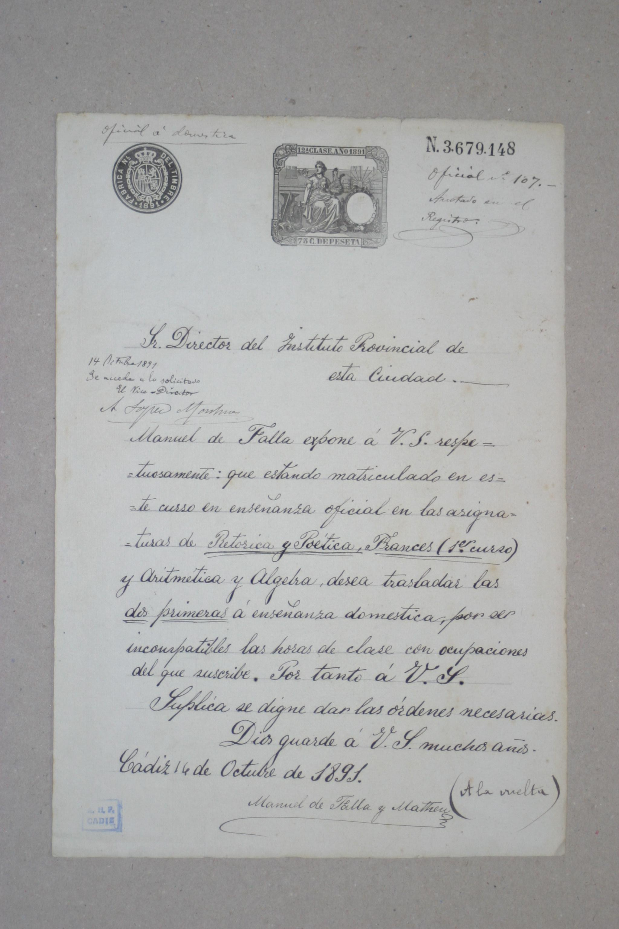 Extracto del expediente escolar de Manuel de Falla